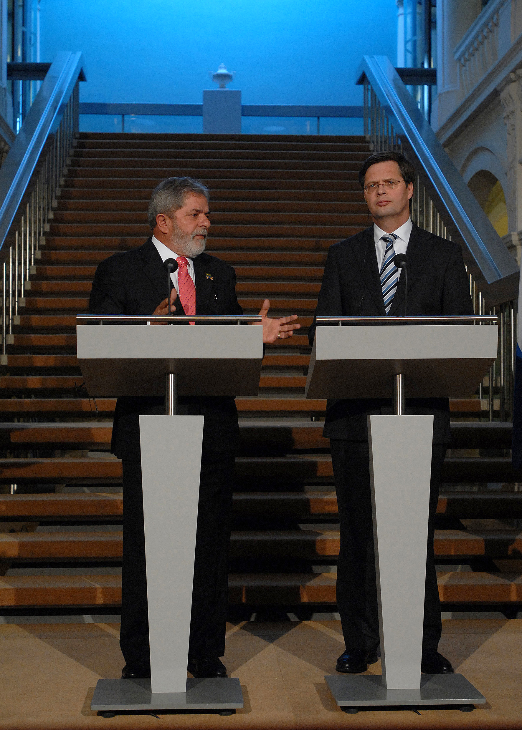 Após encontro, presidente Luiz Inácio Lula da Silva e o primeiro-ministro, Jan Peter Balkenende, falam à imprensa